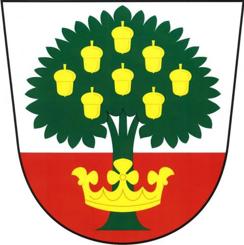 Plískov znak